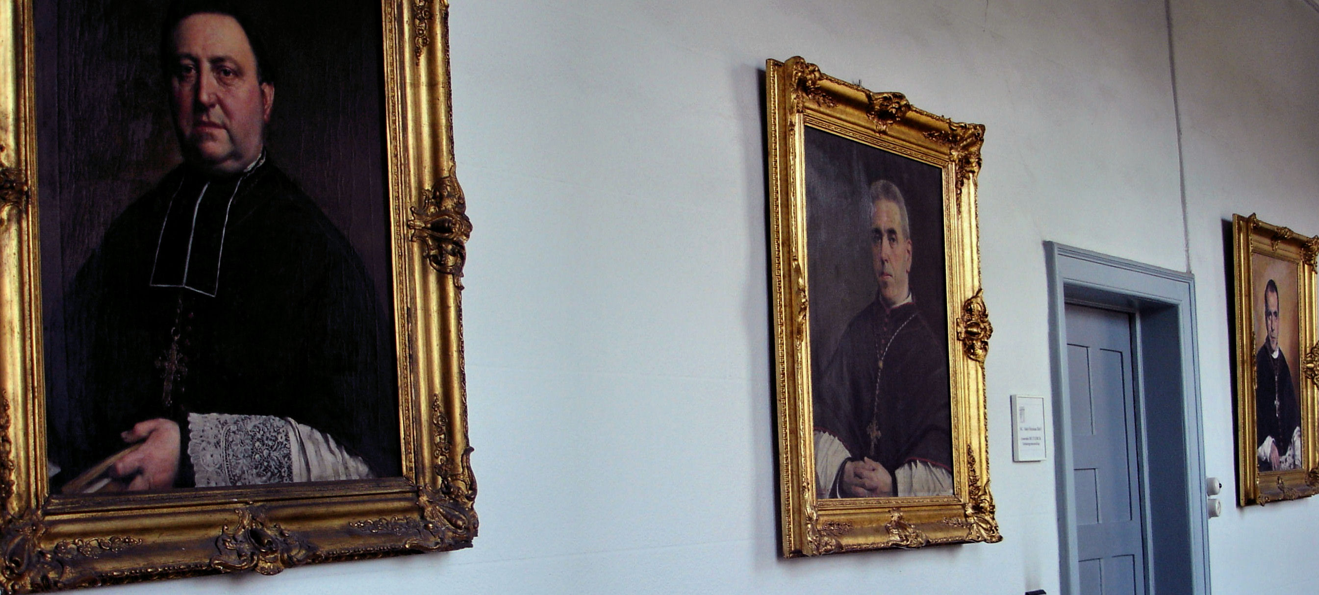 Sint-Jozef-Klein-Seminarie, de portrettengang van de hoge clerus, links superior Stillemans own work